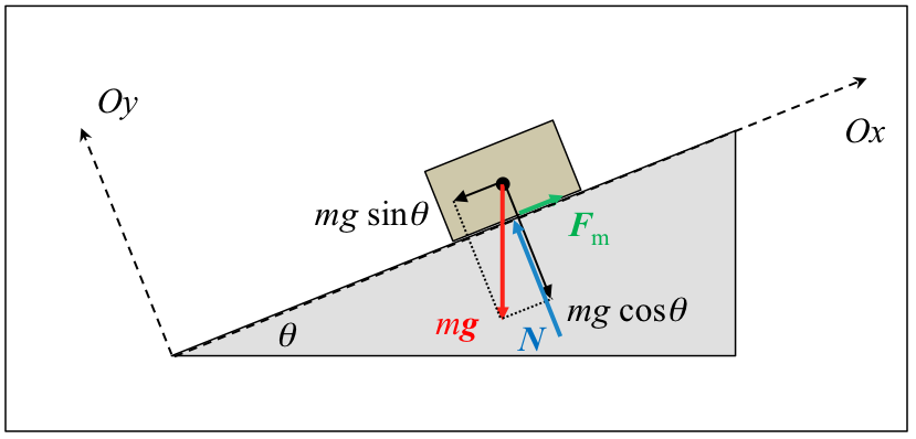 Plano inklinatuan dagoen gorputzean eragiten duten indarren osagaiak